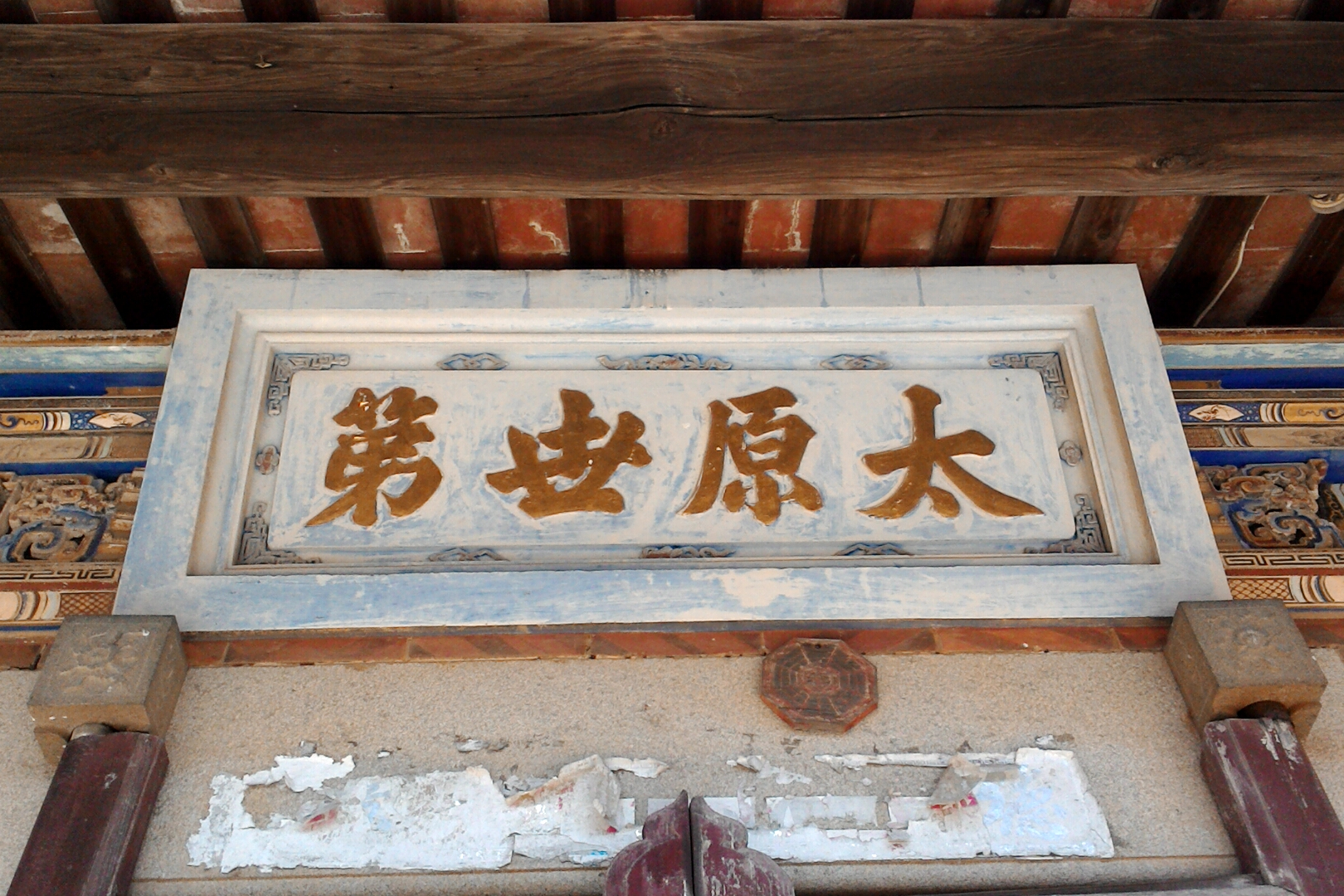 山后聚落「太原世第」匾,福建省金門縣金沙鎮三山里